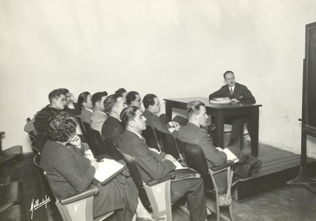 Alfredo Chavero e Híjar dado clases en la EBC en los años 30.